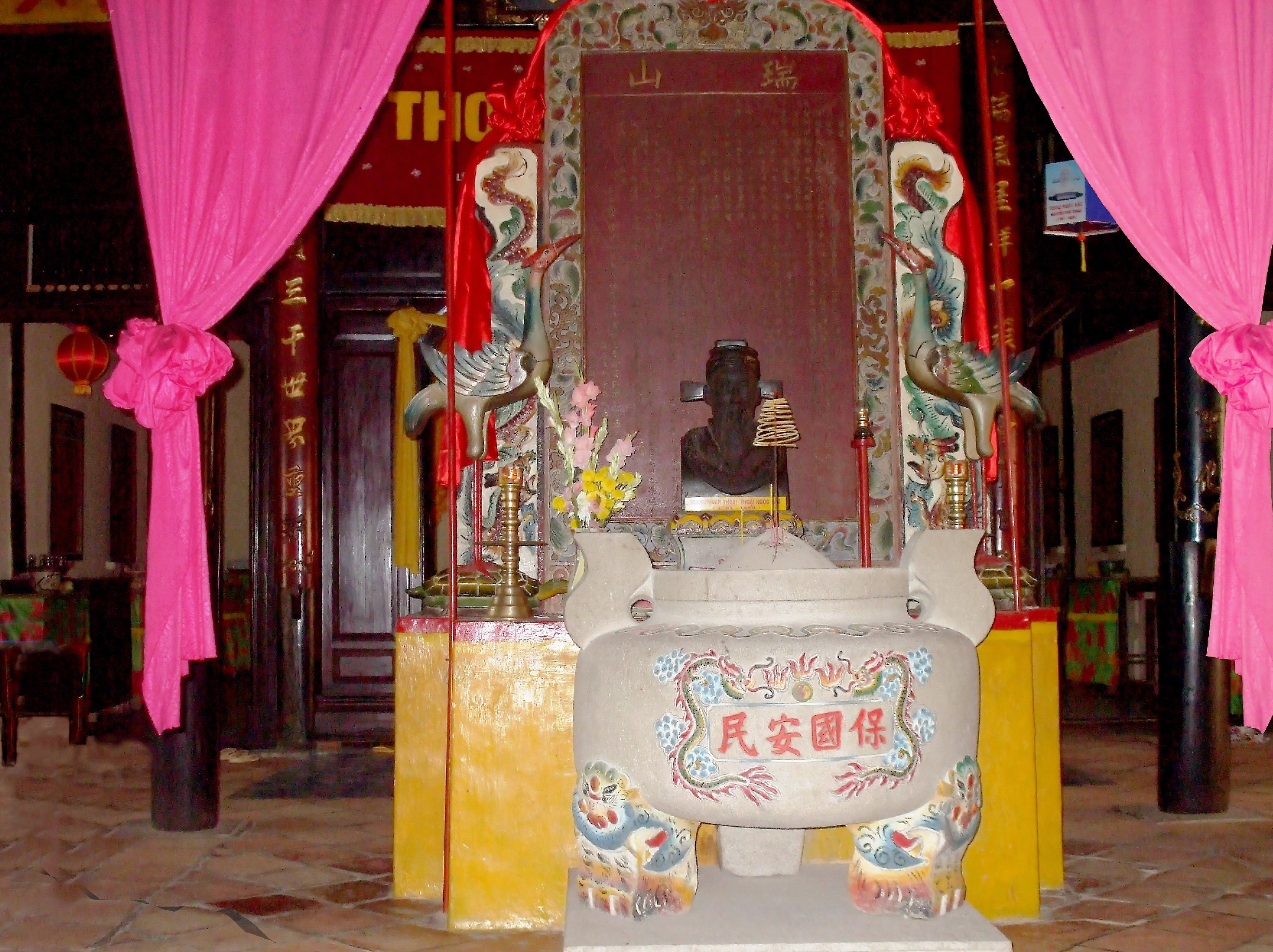 Bia Thoại Sơn được dựng vào năm 1822. Hiện bia xưa được bảo quản khá tốt trong đình thần Thoại Ngọc Hầu tại triền núi Sập, huyện Thoại Sơn, tỉnh An Giang, Việt Nam.